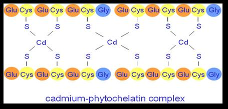 Chélation du cadmium par les unités cystéines d'une phytochélatine.